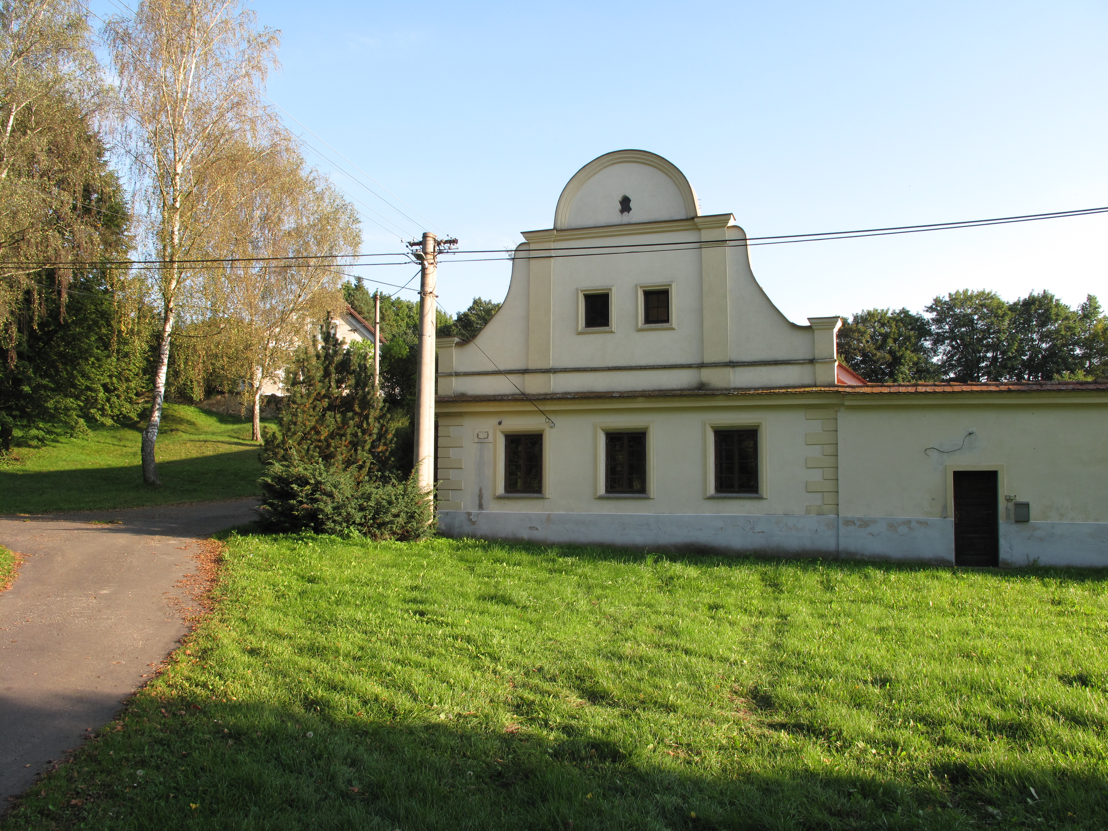 Fasáda domu v Kožlí. Okres Strakonice, Česká republika.